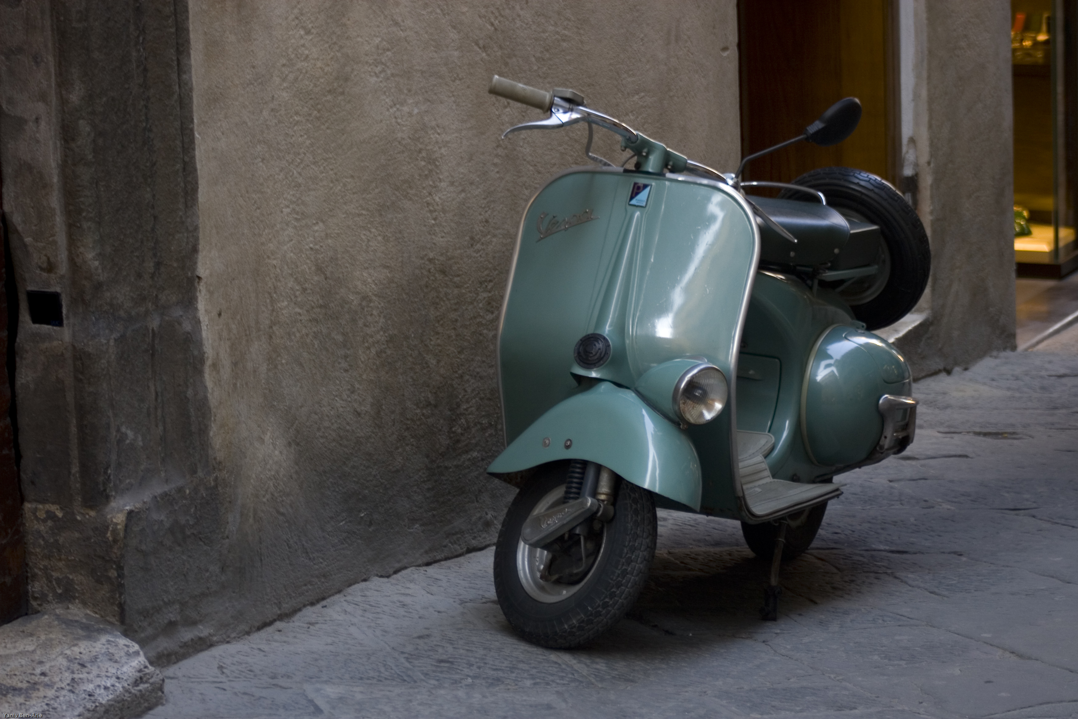 Fender light Vespa, VESPA N 1952